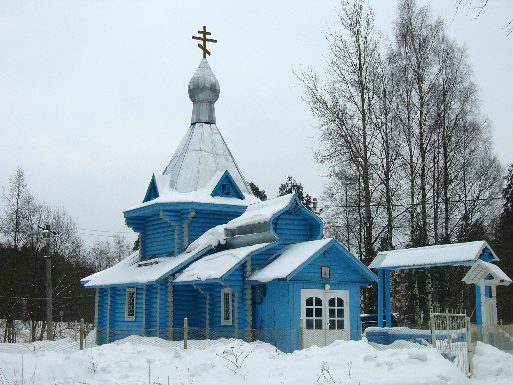 Церковь целителя Пантелеймона рядом с Первомайской больницей